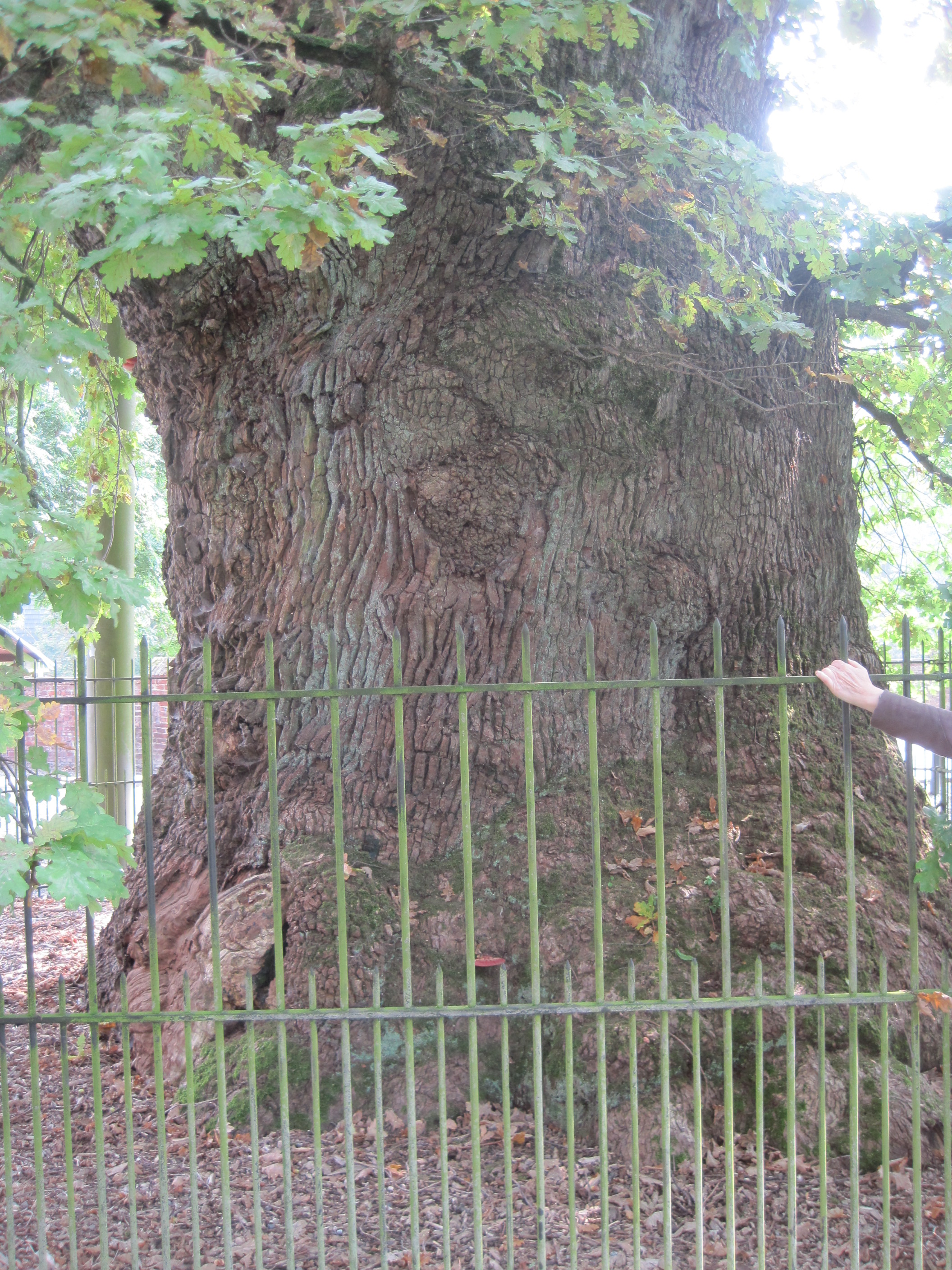 Le vieux chêne de Liernu, croissant sur la voirie communale